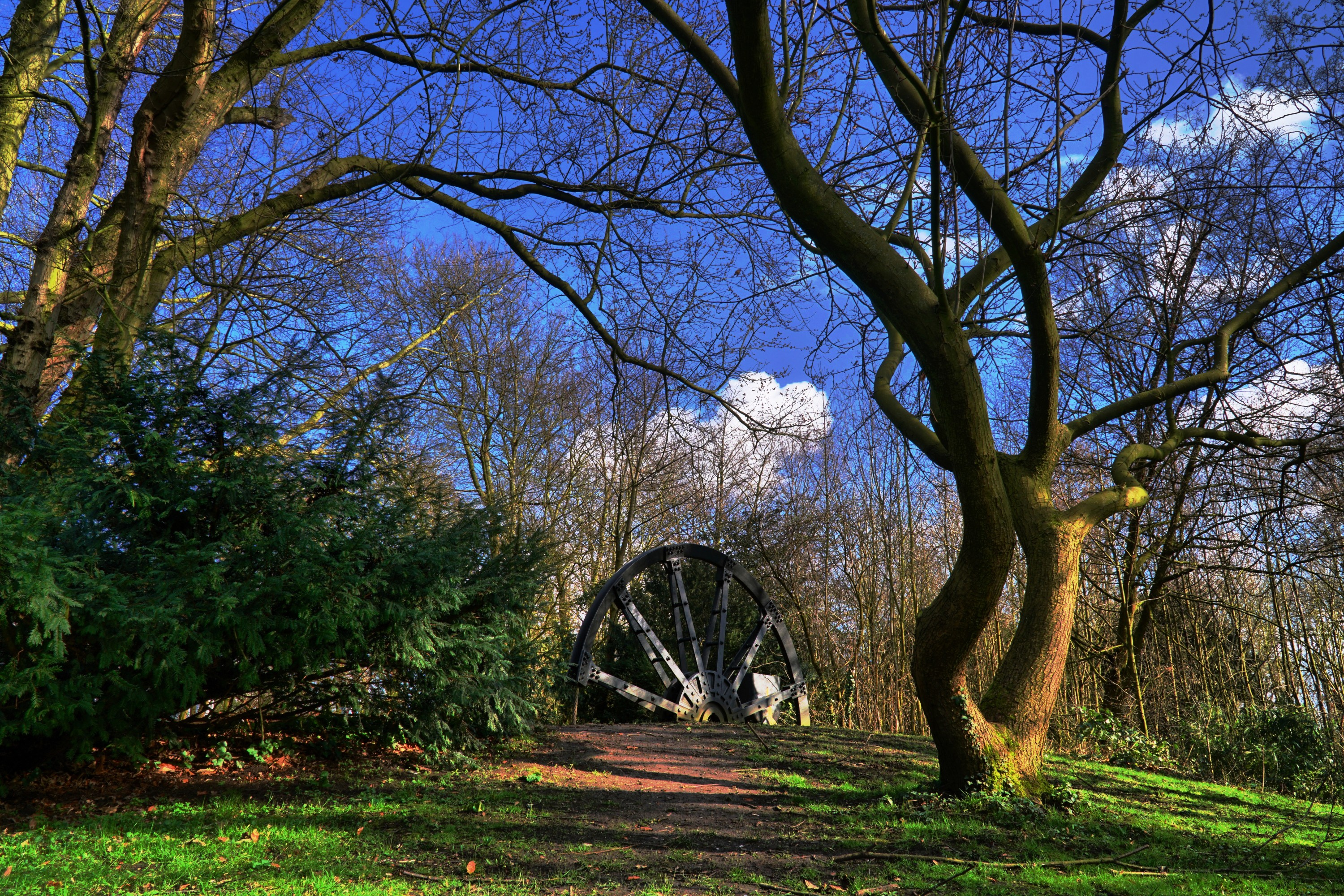 Dieses Denkmal befindet sich im Ruhrpark nahe der Kewerstr. und des Spielplatzes